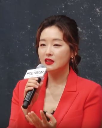 SBS 수목 드라마 '닥터탐정' 제작발표회가 16일 오후 서울 양천구 목동 SBS 사옥에서 열렸다.